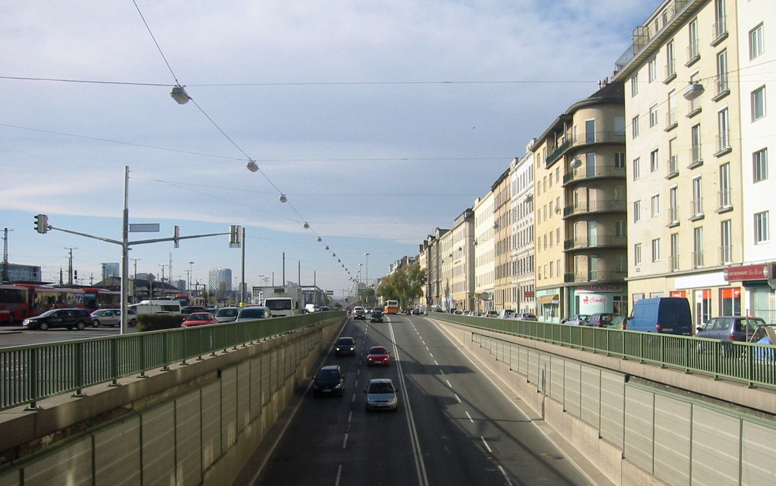 Wien, Wiedner Gürtel